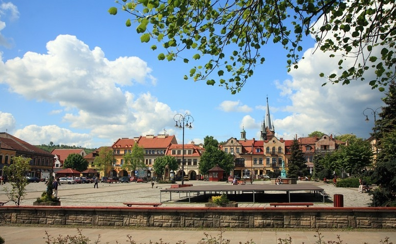 Myślenice (województwo małopolskie)